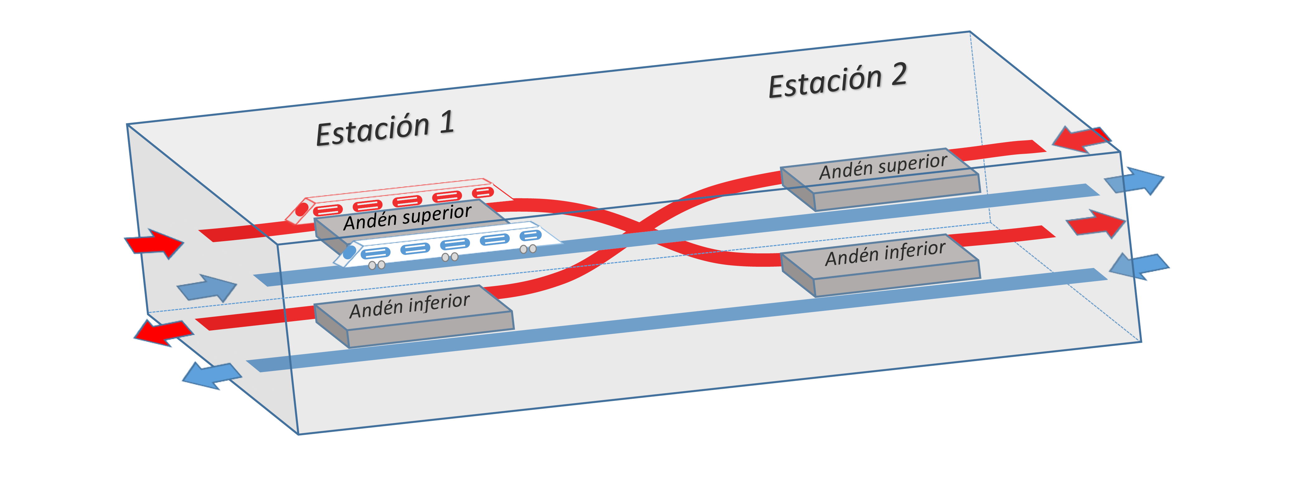 Esquema de la distribución de vías y andenes en la conexión de dos líneas de metro según la denominada "Solución Bustinduy"